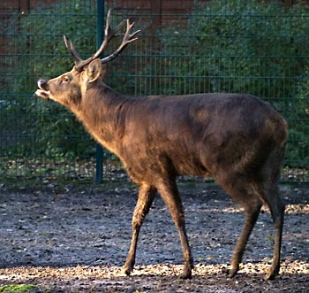 Bildbeschreibung: Barasingha (Cervus duvauceli)